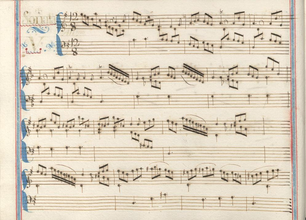 La sonate K. 103, telle qu'elle se présente dans le manuscrit de Venise, volume III no. 24.